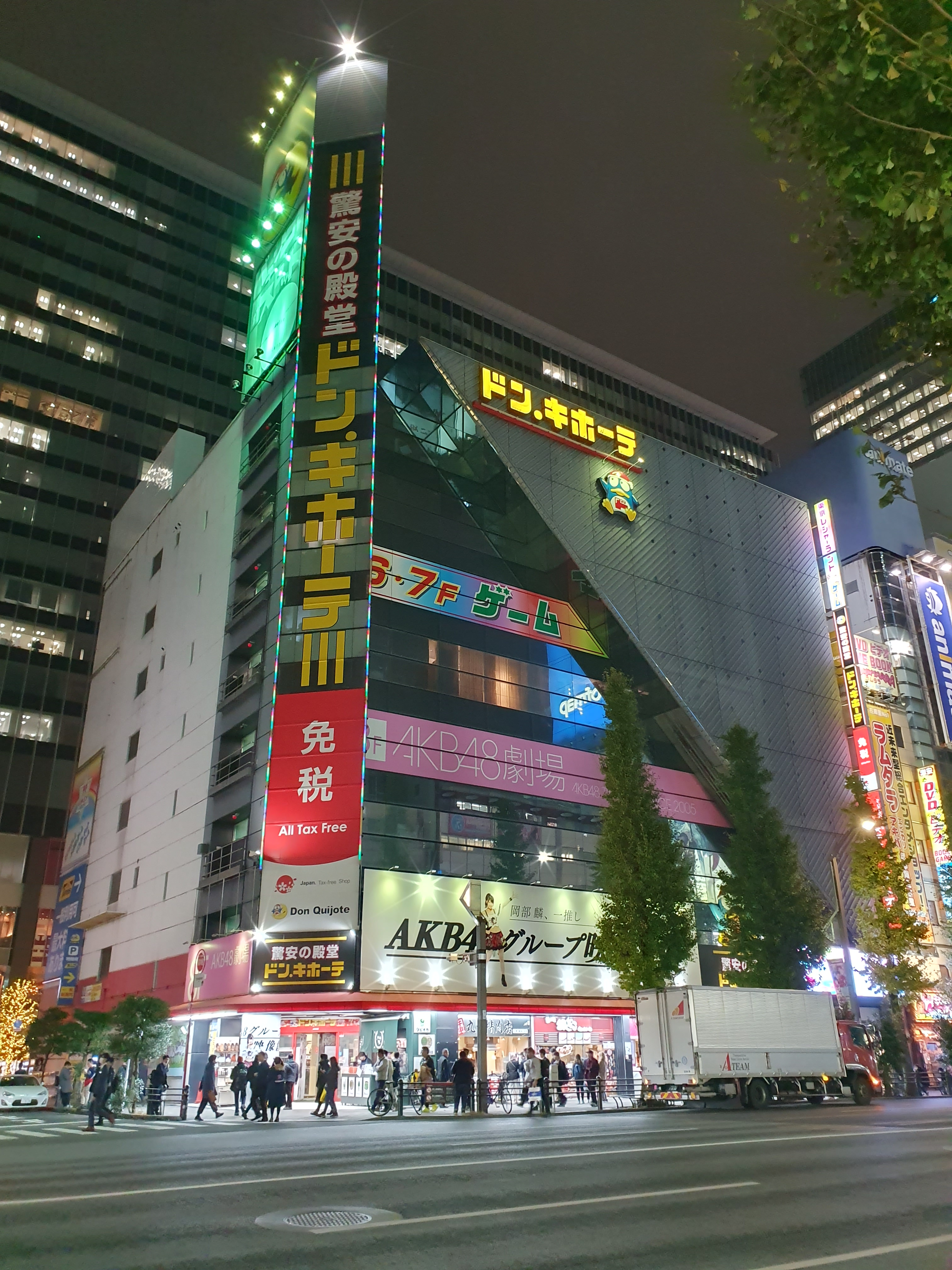 Don Quijote, tempat teater AKB48 berada, November 2019